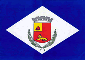 Bandeira da cidade de Rio Claro, do estado de São Paulo.